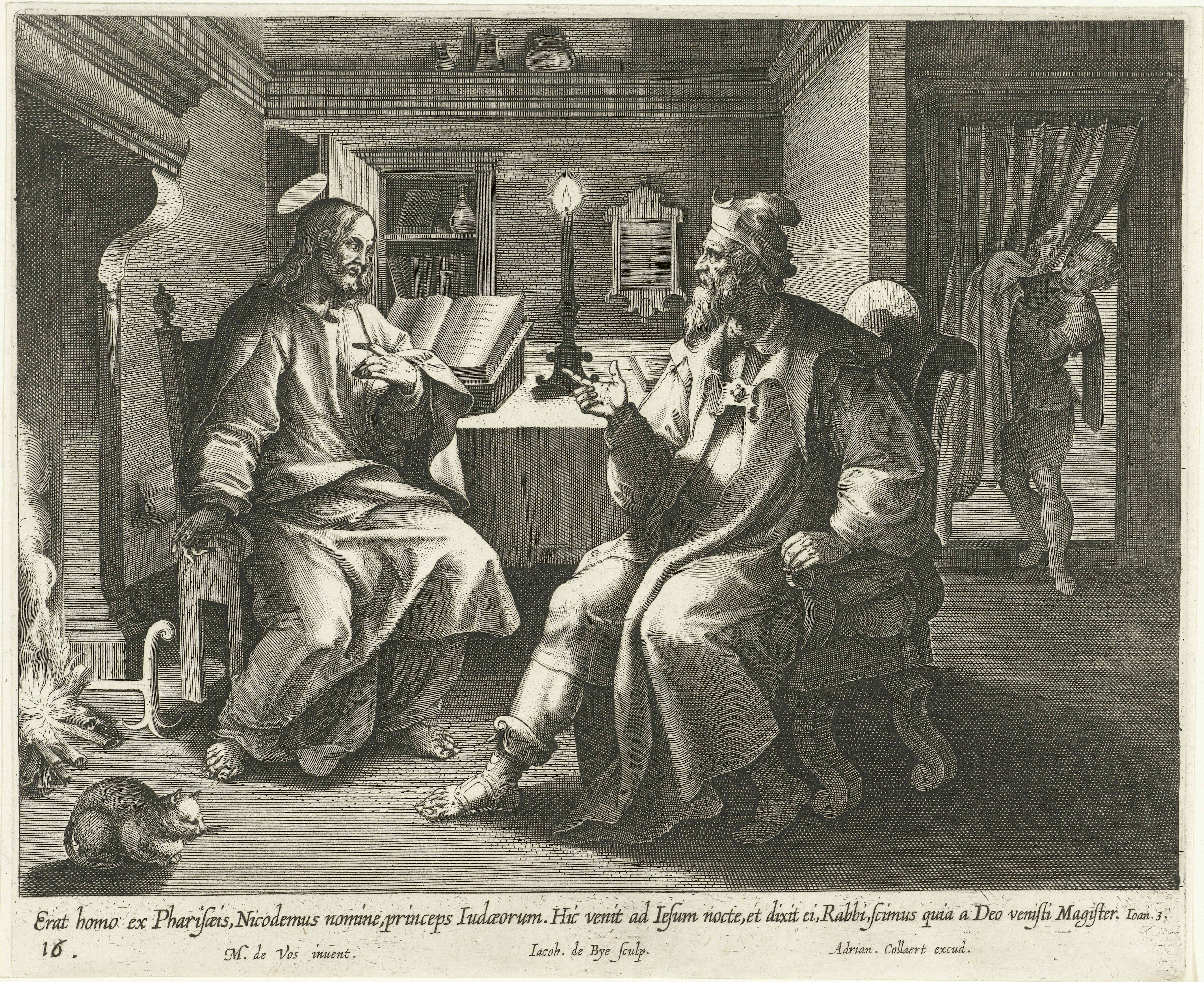 IdentificatieTitel(s): Gesprek met NikodemusVita, passio et Resvrrectio Iesv Christi (serietitel)Leven, passie en wederopstanding van Christus (serietitel)Objecttype: prent Serienummer: 16/51Objectnummer: RP-P-1885-A-9638Catalogusreferentie: New Hollstein Dutch 189-2(3)Opschriften / Merken: verzamelaarsmerk, verso midden onder, gestempeld: Lugt 2228Omschrijving: Het interieur van een huis. De farizeeër Nikodemus is in gesprek met Christus in het midden van de nacht (Johannes 3:1-21). De prent heeft een Latijns onderschrift. De prent maakt deel uit van een serie over het leven van Christus.VervaardigingVervaardiger: prentmaker: Jacques de Bie (vermeld op object)naar ontwerp van: Maerten de Vos (vermeld op object)uitgever: Adriaen Collaert (vermeld op object)Plaats vervaardiging: AntwerpenDatering: 1598 - 1618Fysieke kenmerken: gravureMateriaal: papier Techniek: graveren (drukprocedé)Afmetingen: blad: h 179 mm × b 220 mmOnderwerpWat: Christ talking with Nicodemus at night (John 3:1-21)Verwerving en rechtenVerwerving: aankoop 1885Copyright: Publiek domein